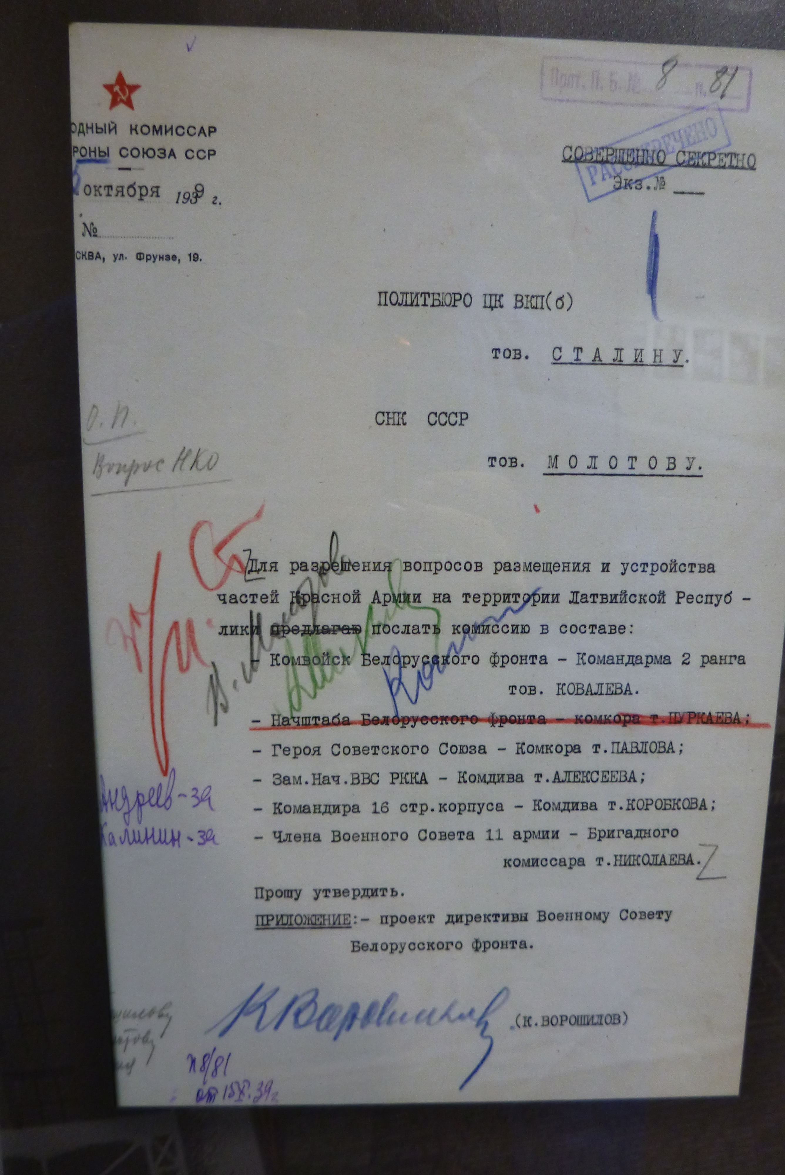 Докладная записка К.Е. Ворошилова И.В. Сталину и В.М. Молотову от 15 октября 1939 года. Хранится в РГАСПИ. Ф. 17. Оп. 166. Д. 615. Л. 59 (подлинник, машинописный текст)